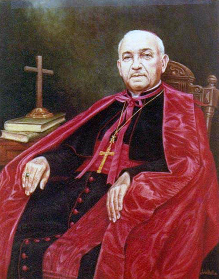 Digitalización de una pintura del Cardenal Beras, previamente impresa.